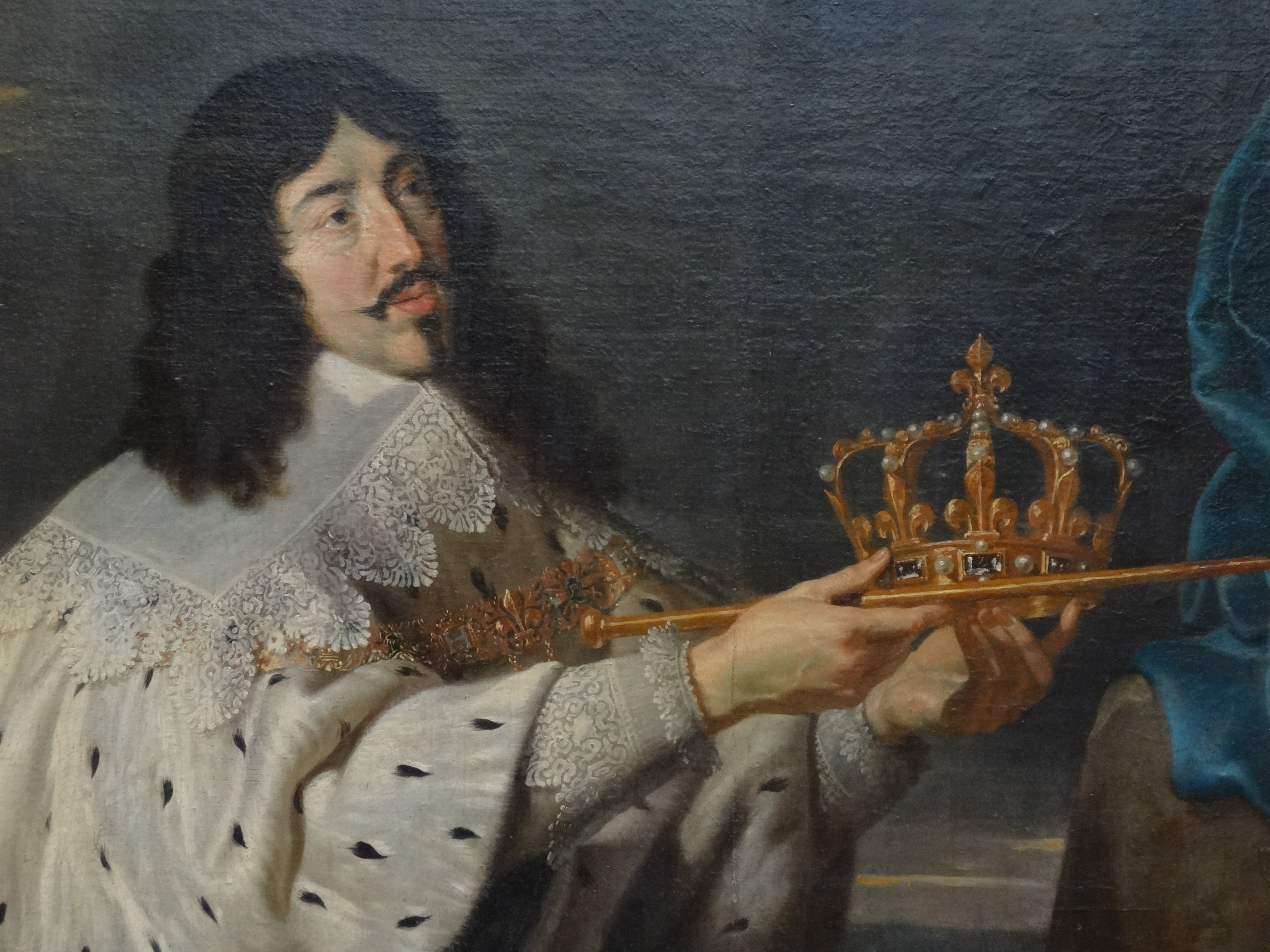 Détail